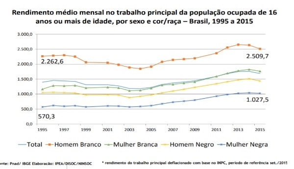 Rendimento médio mensal no trabalho principal da população ocupada de 16 anos ou mais de idade, sexo e raça/cor